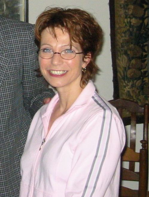 René Appel und seine deutsche Übersetzerin Stefanie Schäfer bei einer Lesung in Moers am 29.4.2004